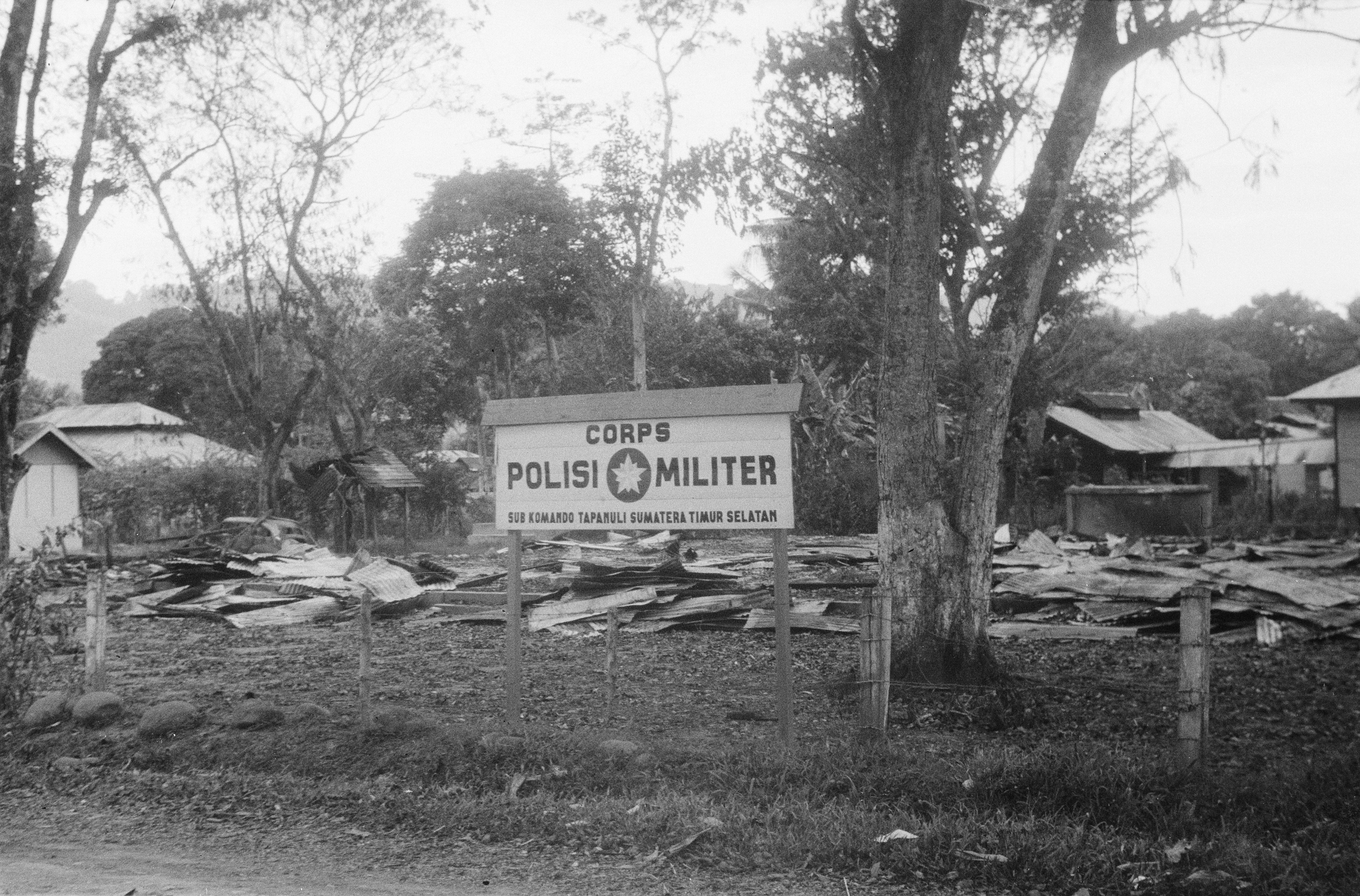 Collectie / Archief : Fotocollectie Dienst voor Legercontacten Indonesië Reportage / Serie : [DLC] Opmars door Tapanoeli, Taroetoeng, Sibolga, Padang, Sidempoean Beschrijving : Niets rest meer van het voormalige hoofdkwartier van het Corps Polisi Militer sub komando Tapanuli Sumatera Timur Selatan Datum : december 1948 Locatie : Indonesië, Nederlands-Indië, Sumatra Fotograaf : Huisman, B. / DLC Auteursrechthebbende : Nationaal Archief Materiaalsoort : Negatief (zwart/wit) Nummer archiefinventaris : bekijk toegang 2.24.04.02 Bestanddeelnummer : 5341